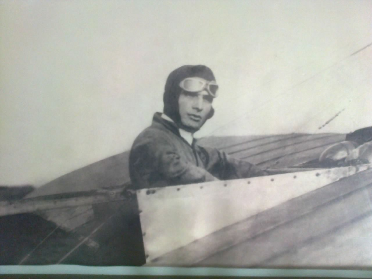 Jorge Puflea al mando de un Bleriot XI